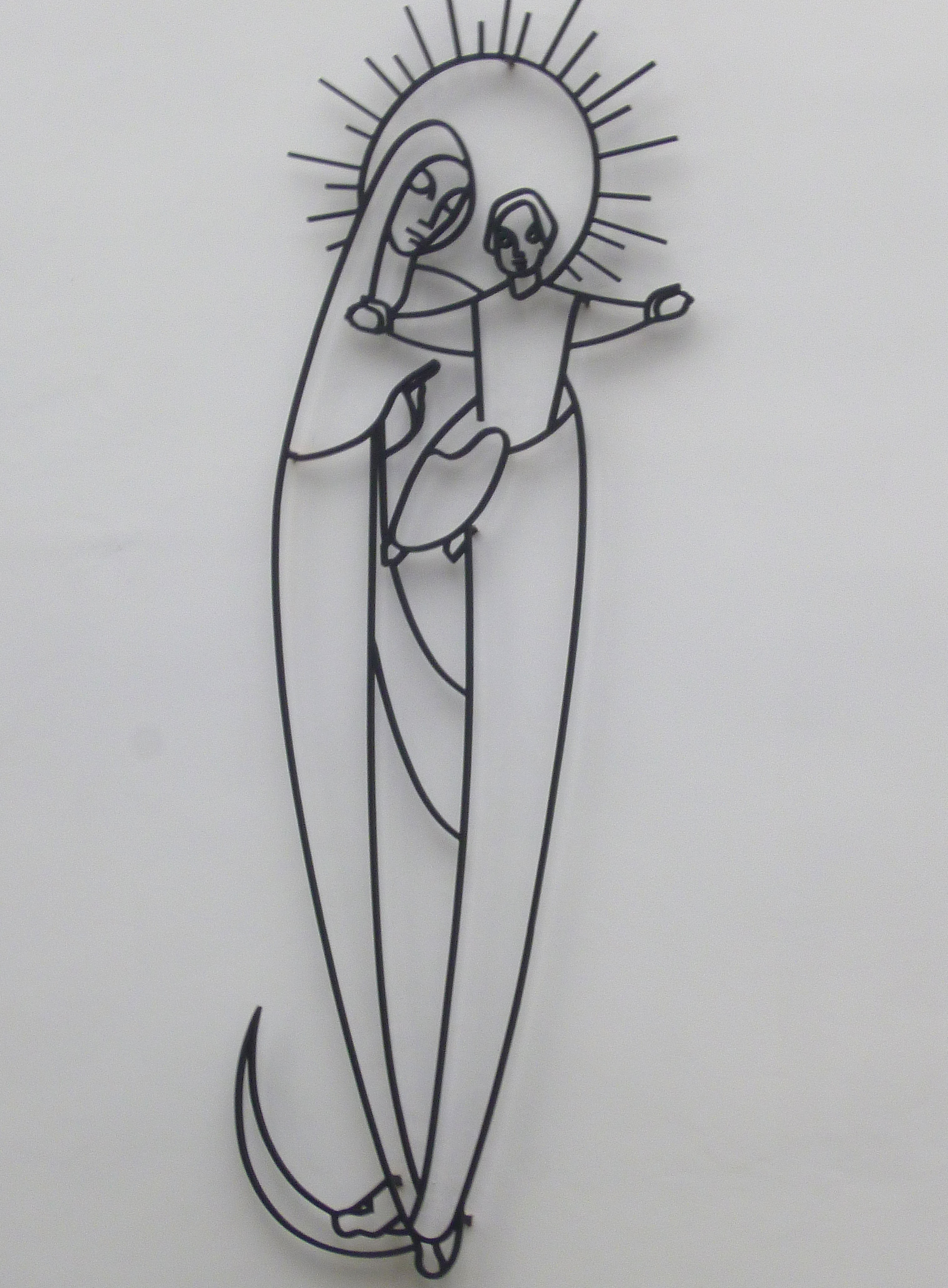 Mariendarstellung an der katholischen Kirche St. Marien in Halle-Ammendorf, Brauhausstraße